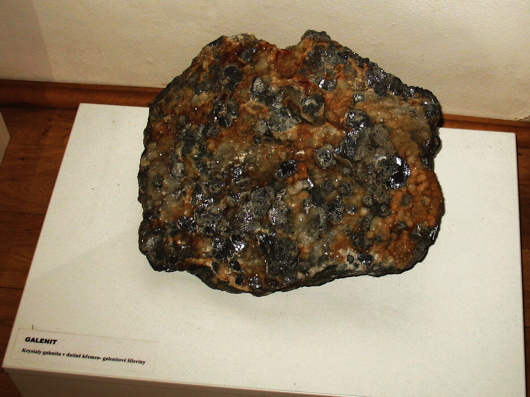 Vzorek galenitu ze stříbrského rebíru